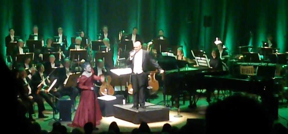 Dirigenten Hans Ek och sopranen Maria Keohane.